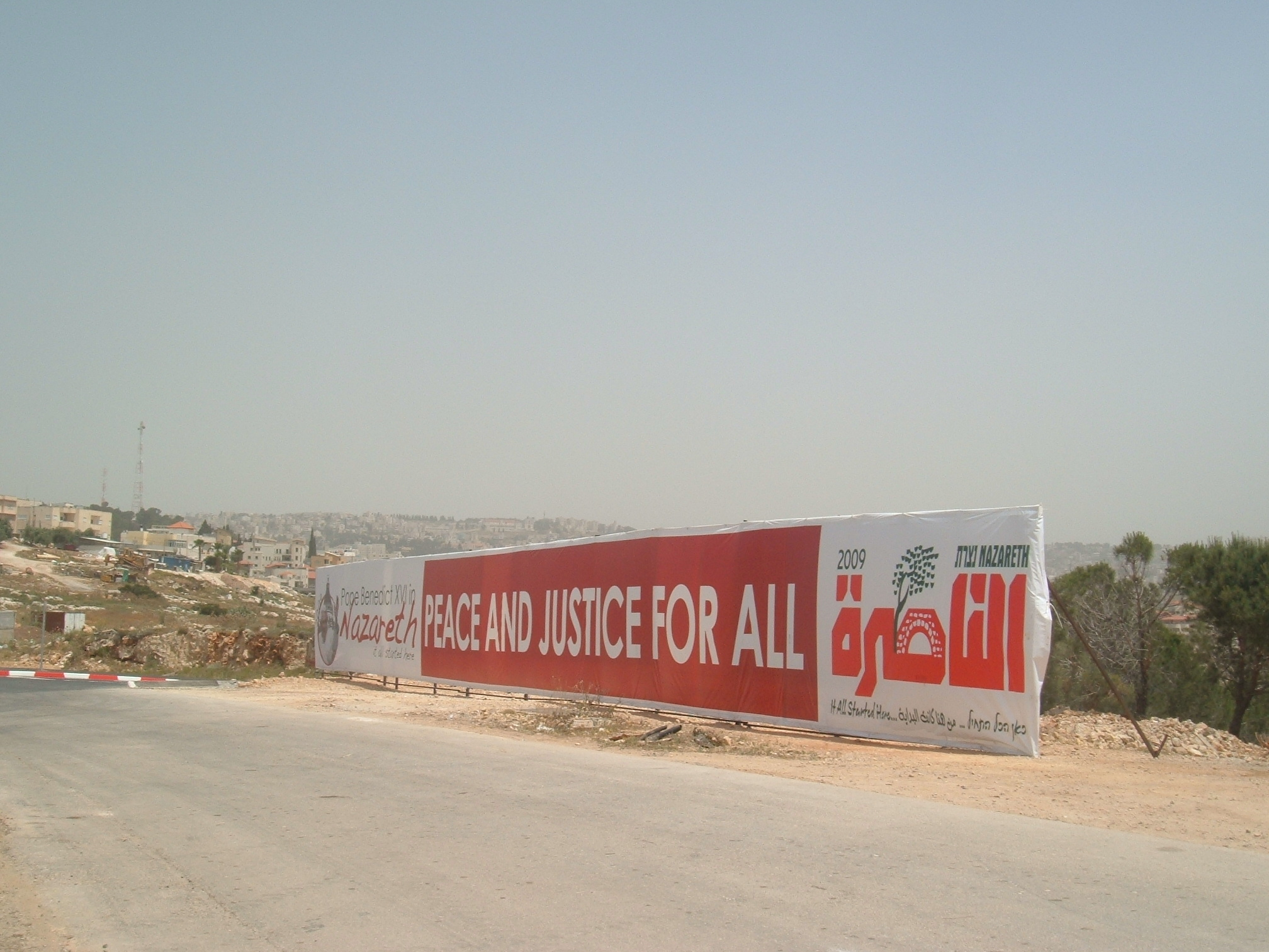 A sign welcoming Pope Benedictus 16th near Mount Precipice Nazareth שלט המברך את האפיפיור בנדיקטוס השישה עשר ליד הר הקפיצה בנצרת